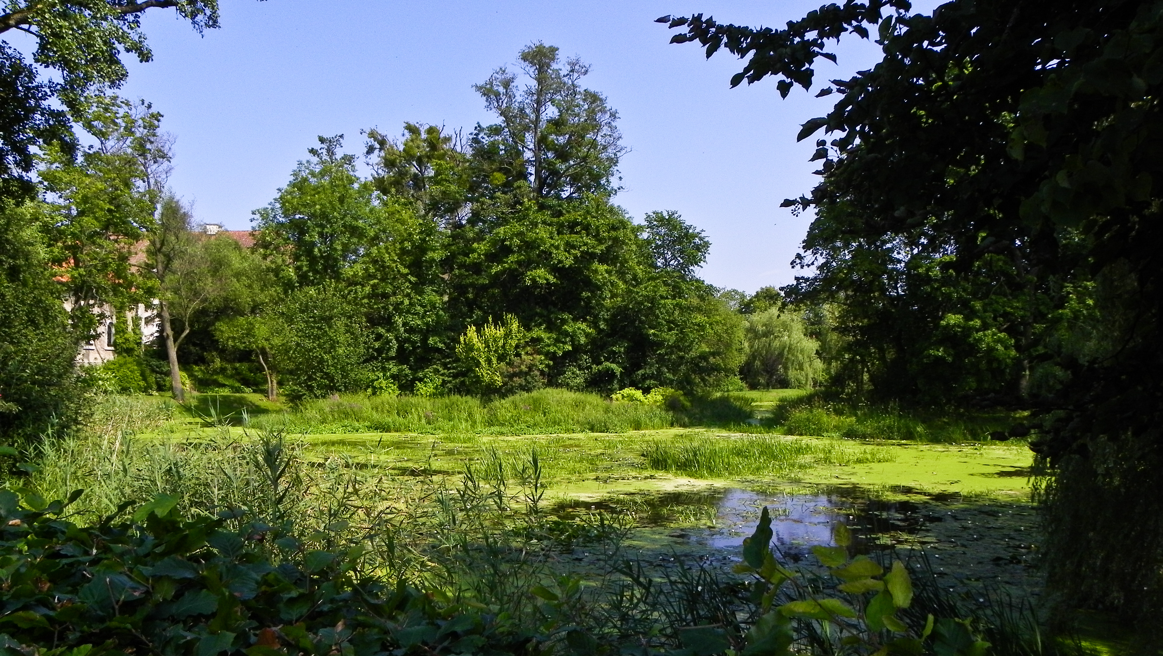 Zabytkowy park w zespole pałacowym w Galinach. 5.11.1981.